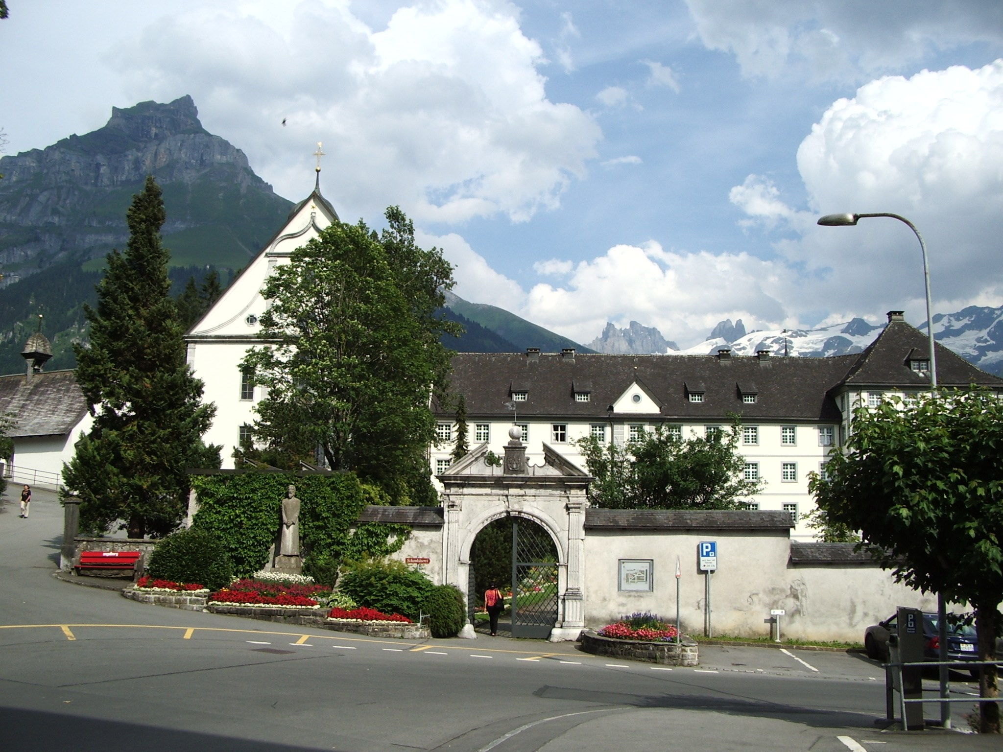 zelf gemaakte foto M. ter Wiel